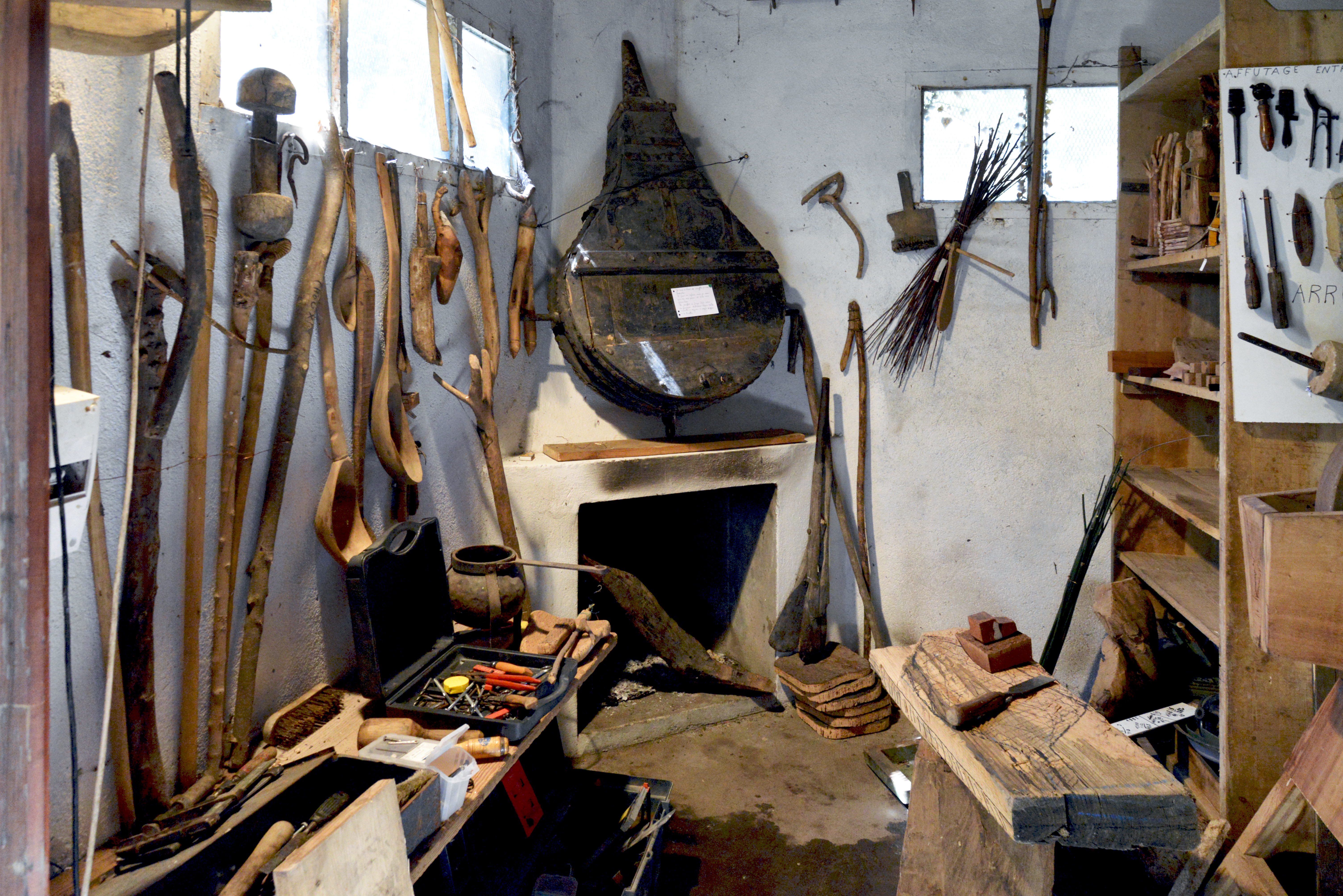 Vezzani, Rogna in Là (Haute-Corse) - Une vue intérieure du musée du bois (a Casetta di u legnu)